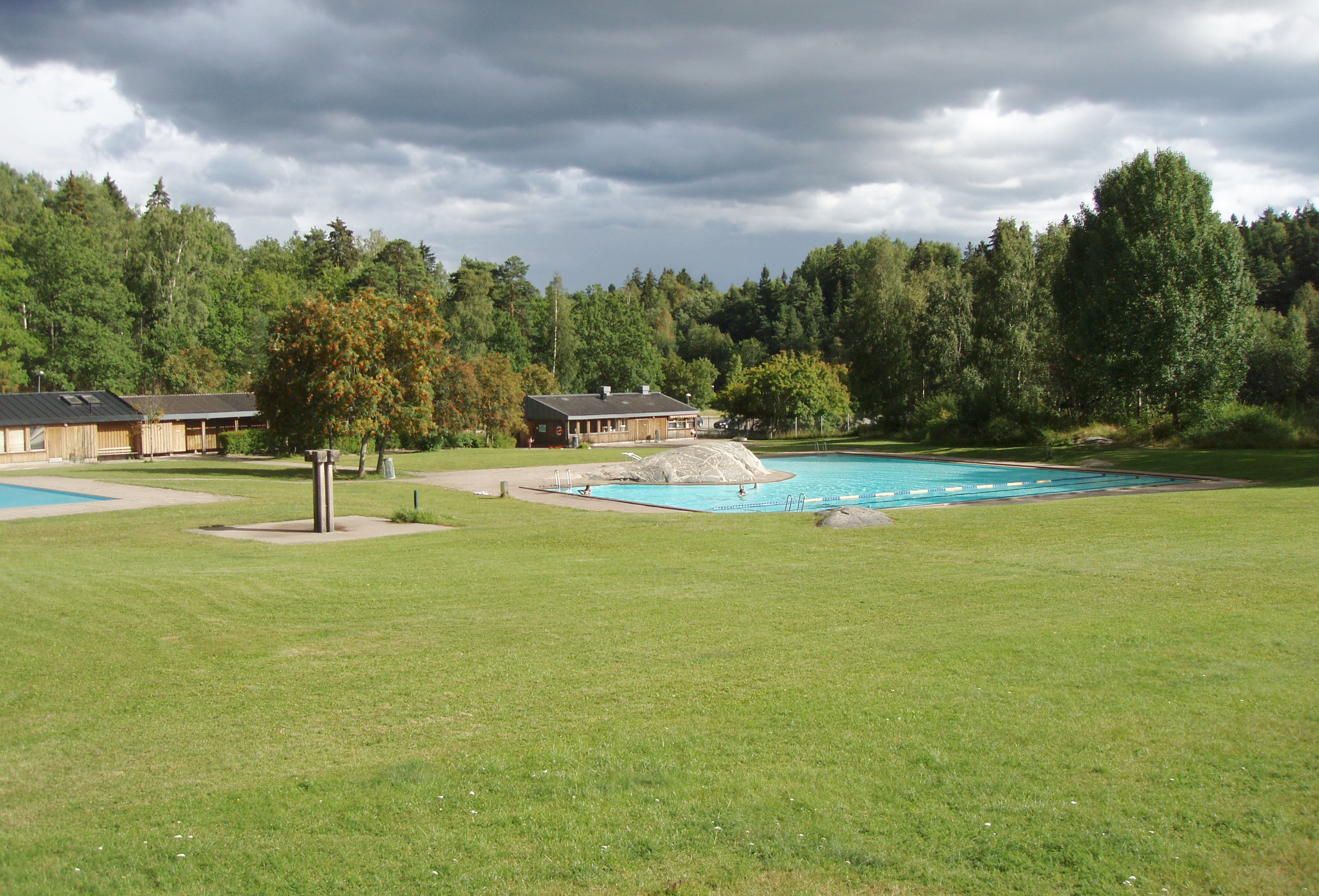 Breviksbadet med de två simbassängerna, reception och omklädningslokal. Omklädningslokalen inrymmer också Breviks motionsgård.